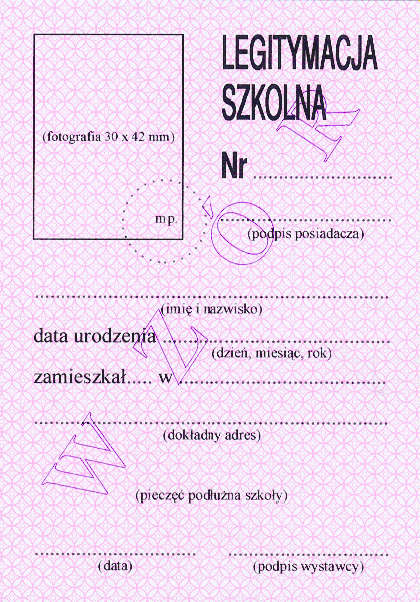 Wzór przedniej strony legitymacji szkolnej dla ucznia pełnosprawnego - wzór MENiS-II/180/2 obowiązujący od 2007